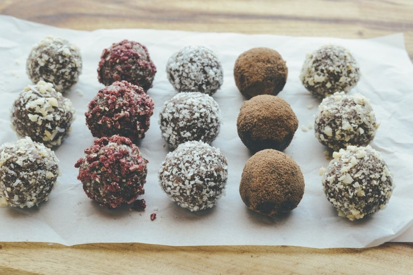 ブリスボールの写真